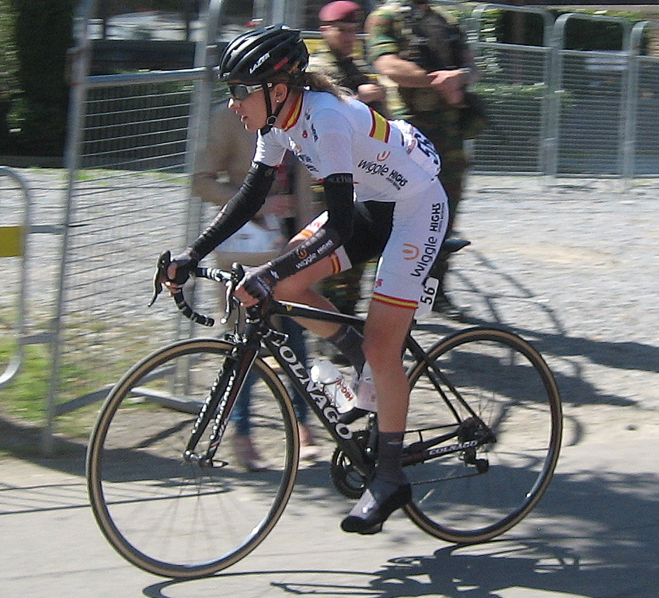 Anna Sanchis (Wiggle High5) in Waalse Pijl 2016